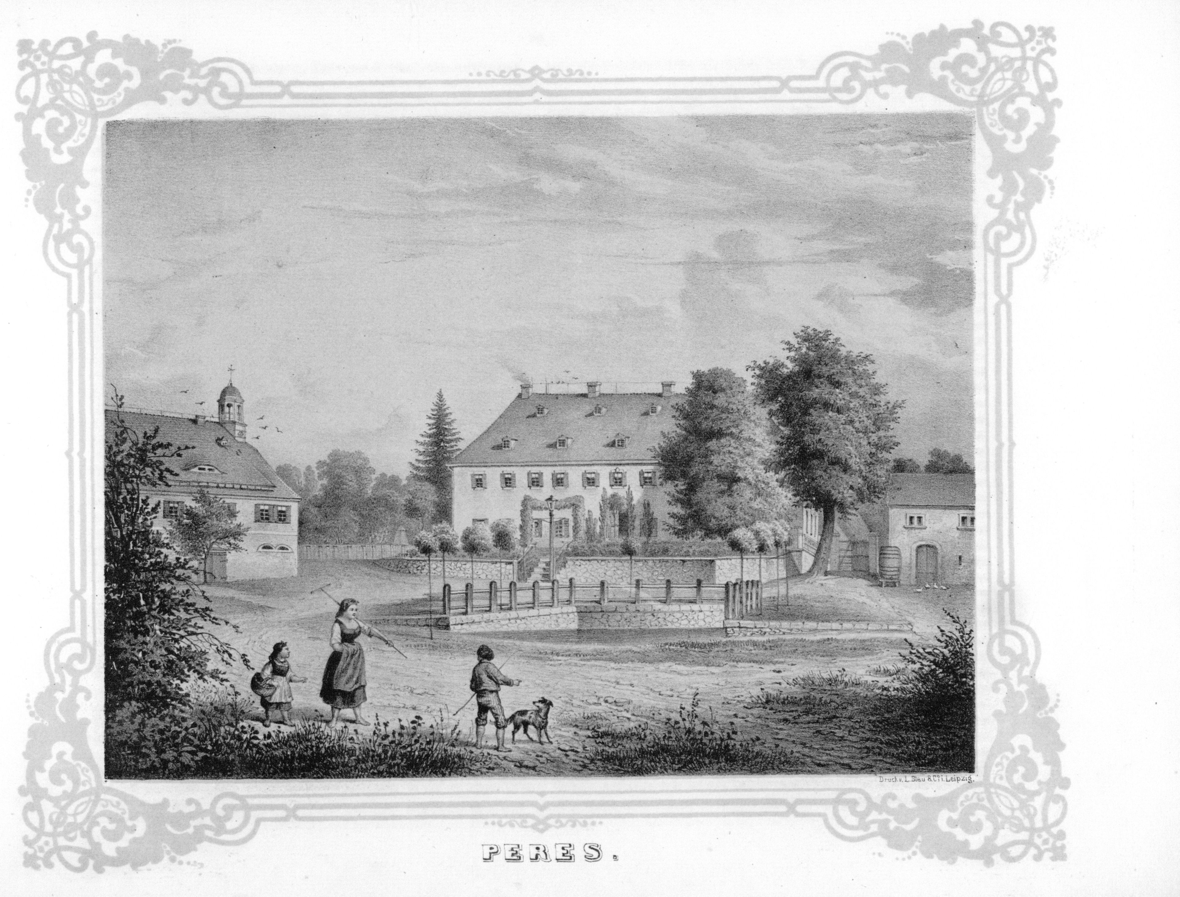 Peres aus: Album der Rittergüter und Schlösser im Königreiche Sachsen Leipziger Kreis Section: I